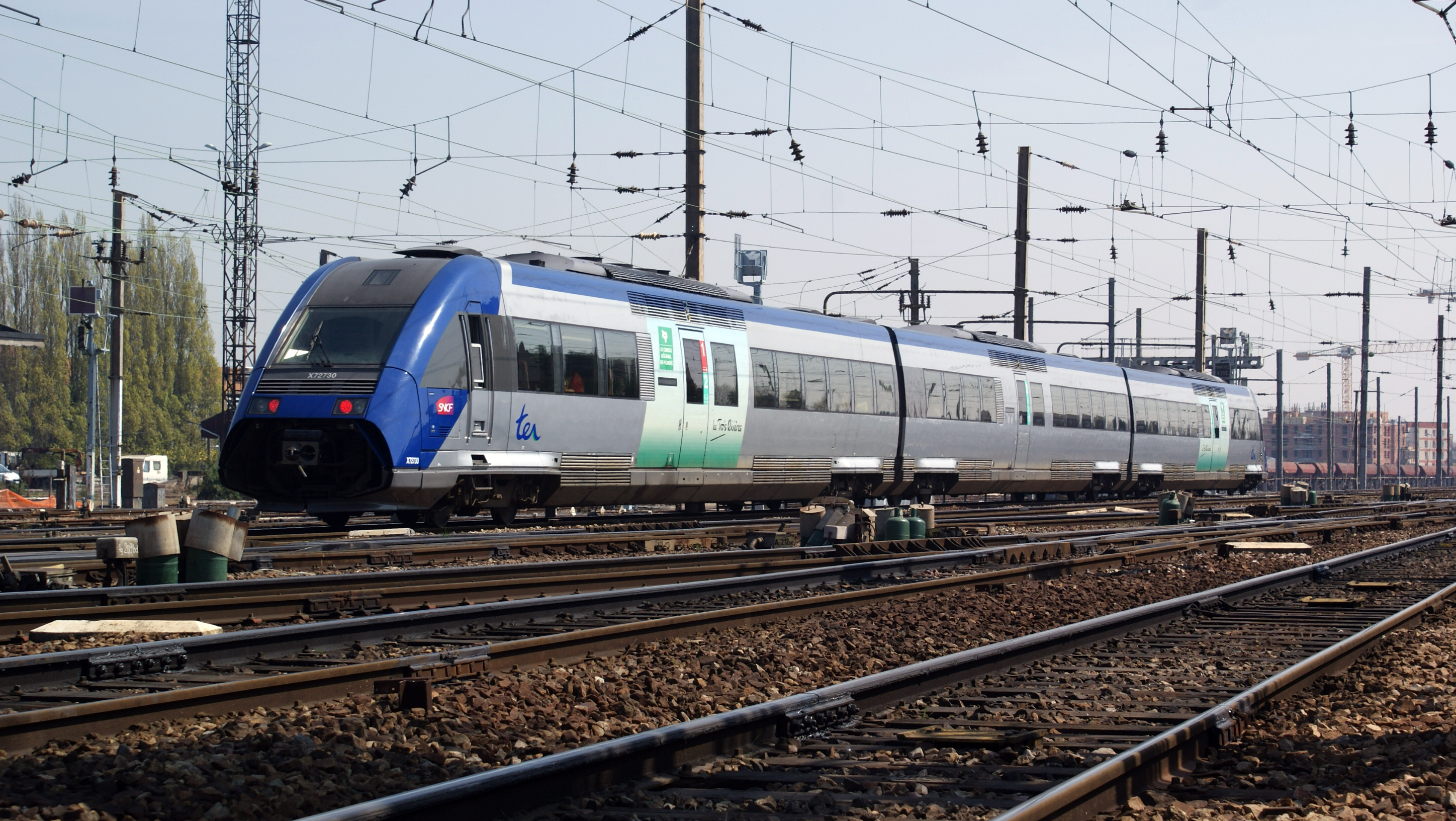 X72725/726 au départ d'Amiens pour Laon